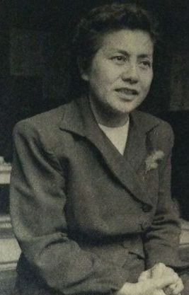 戸叶里子